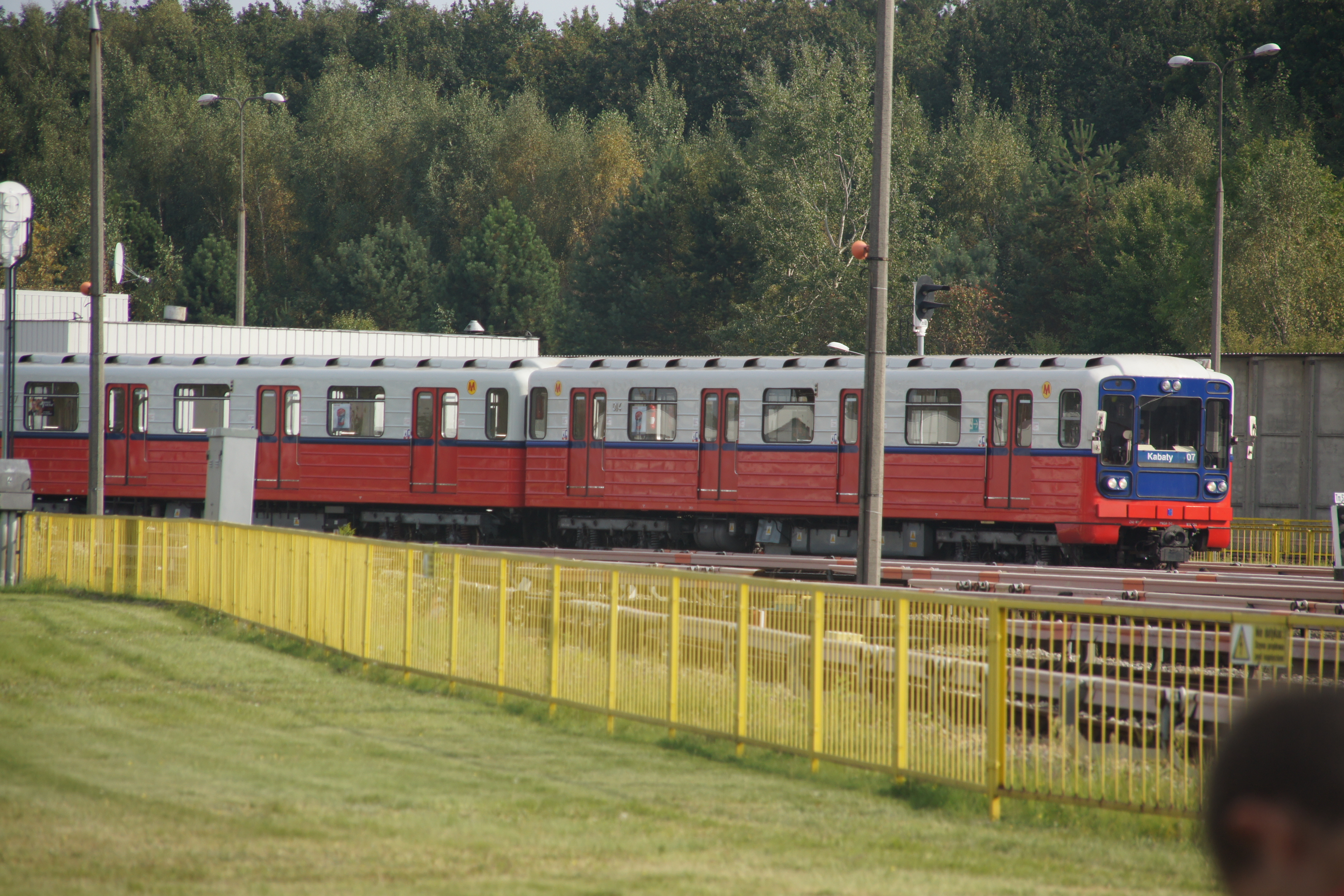 pociąg Metra - Stacja Techniczno-Postojowa Metra na Kabatach